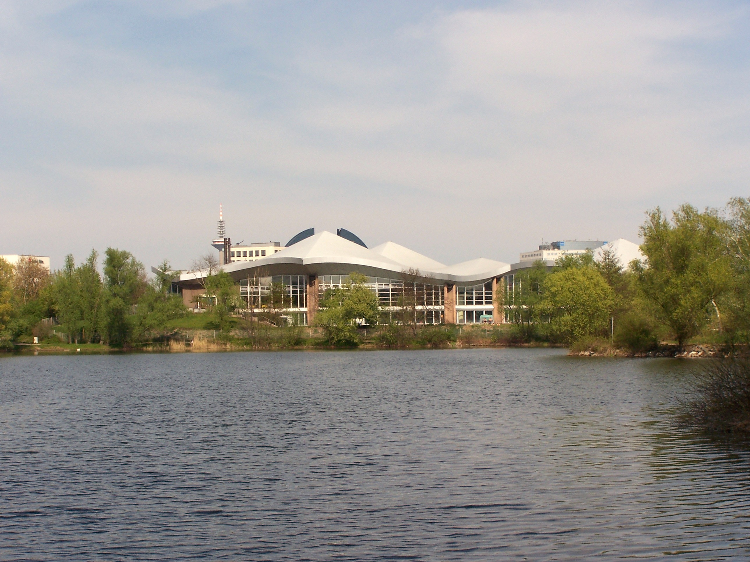 Rebstockbad mit Rebstockweiher im Vordergrund